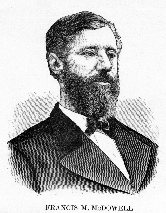 Francis M. McDowell engraving